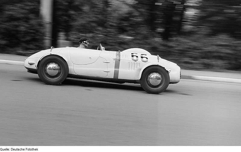 Original image description from the Deutsche Fotothek Stadtparkrennen "Rund um das Scheibenholz"